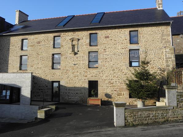 Mairie de Montours (35).